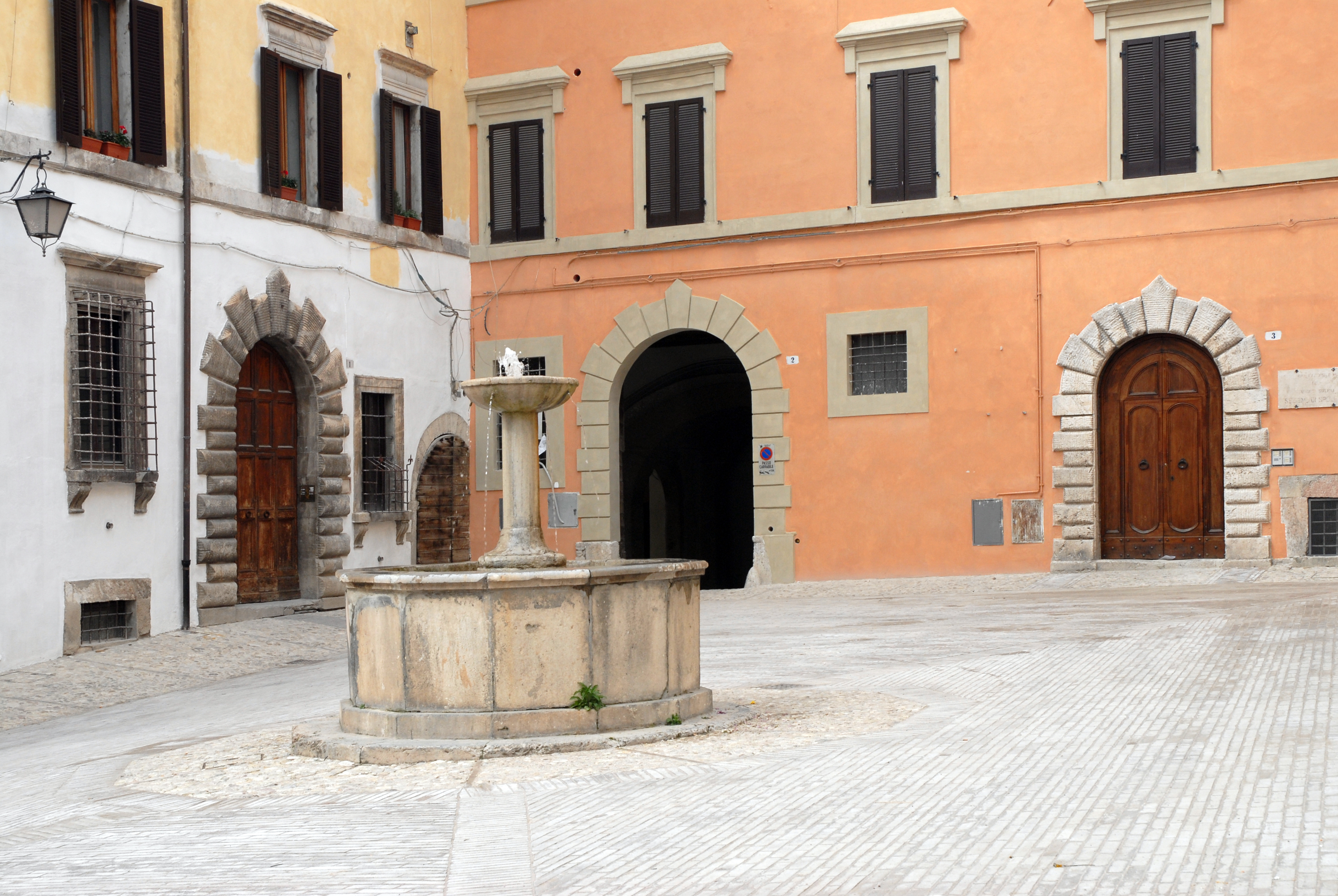 Fontana dei Maccabei Risale al 1500 ed era fino al 1800 in Piazza Pianciani (secondo altri proviene invece da San Paolo Inter Vineas). Poi fu spostata in piazza Fontana, quando venne costruito il nuovo acquedotto. E' un esempio di come a Spoleto si costruisse coi materiali recuperati dal altri monumenti. Fu costruita con lastre recuperate dalla vecchia versione della fontana di piazza del Mercato. Il nomignolo "dei Maccabei" discende dal fatto che la fontana ha dodici lati, dodici come le tribù di Israele. Tra queste quella dei Maccabei (martellatori) più delle altre si addice ad una opera scolpita. La piazza non è intitolata alla fontana qui presente, ma all'illustre Pietro Fontana (1775 - 1854), politico, studioso d'arte, iniziatore della Pinacoteca Comunale, segretario generale e poi prefetto del Dipartimento del Trasimeno. Gonfaloniere di Spoleto per cinque anni (1832 - 1828) nel periodo in cui era Papa lo spoletino Leone XII.